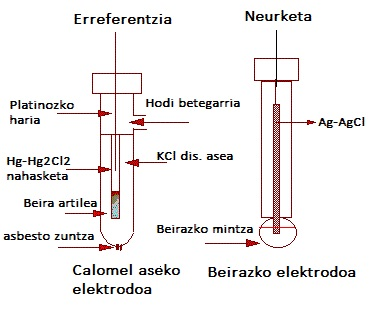 pH elektrodoak